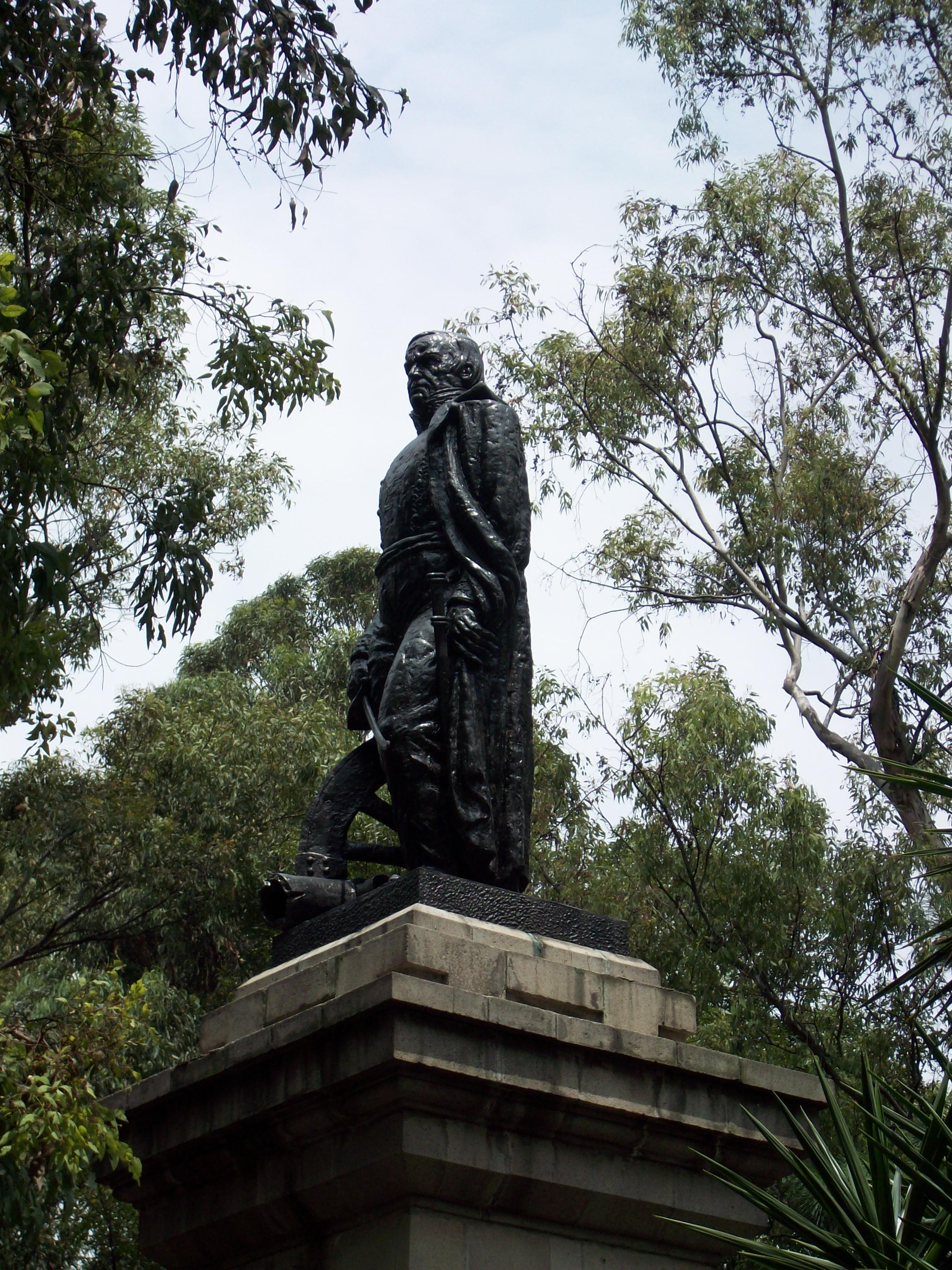 General Anaya